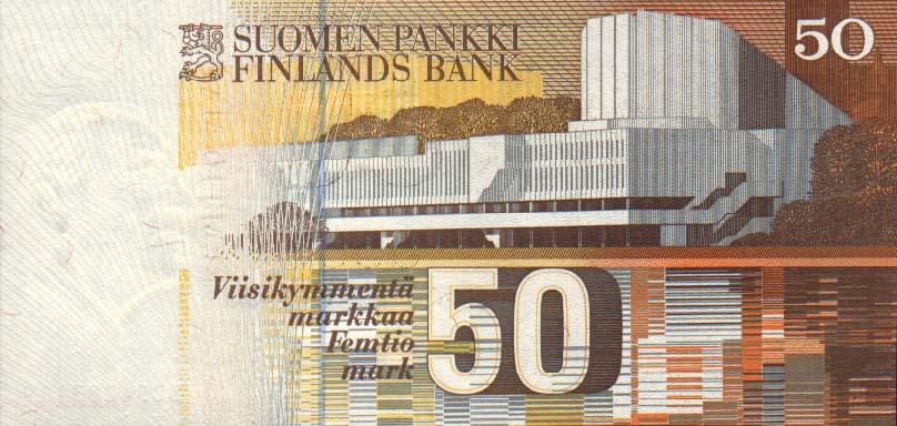 50 markkaa